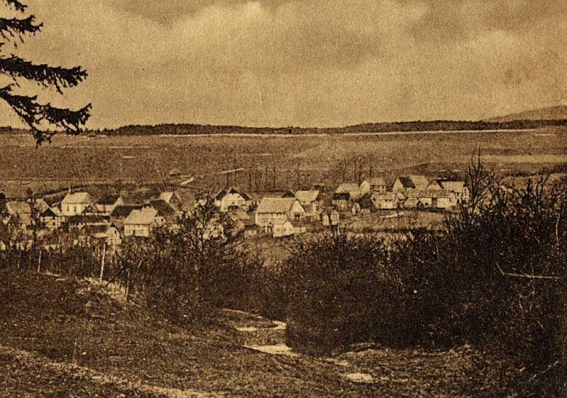 Bracht (Schmallenberg), Anno 1917, in Germany.